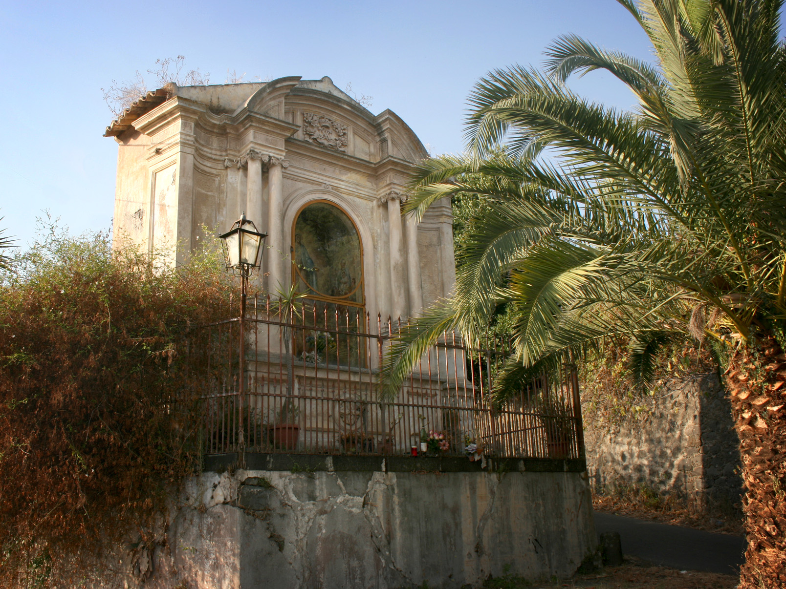 edicola settecentesca a Macchia di Giarre